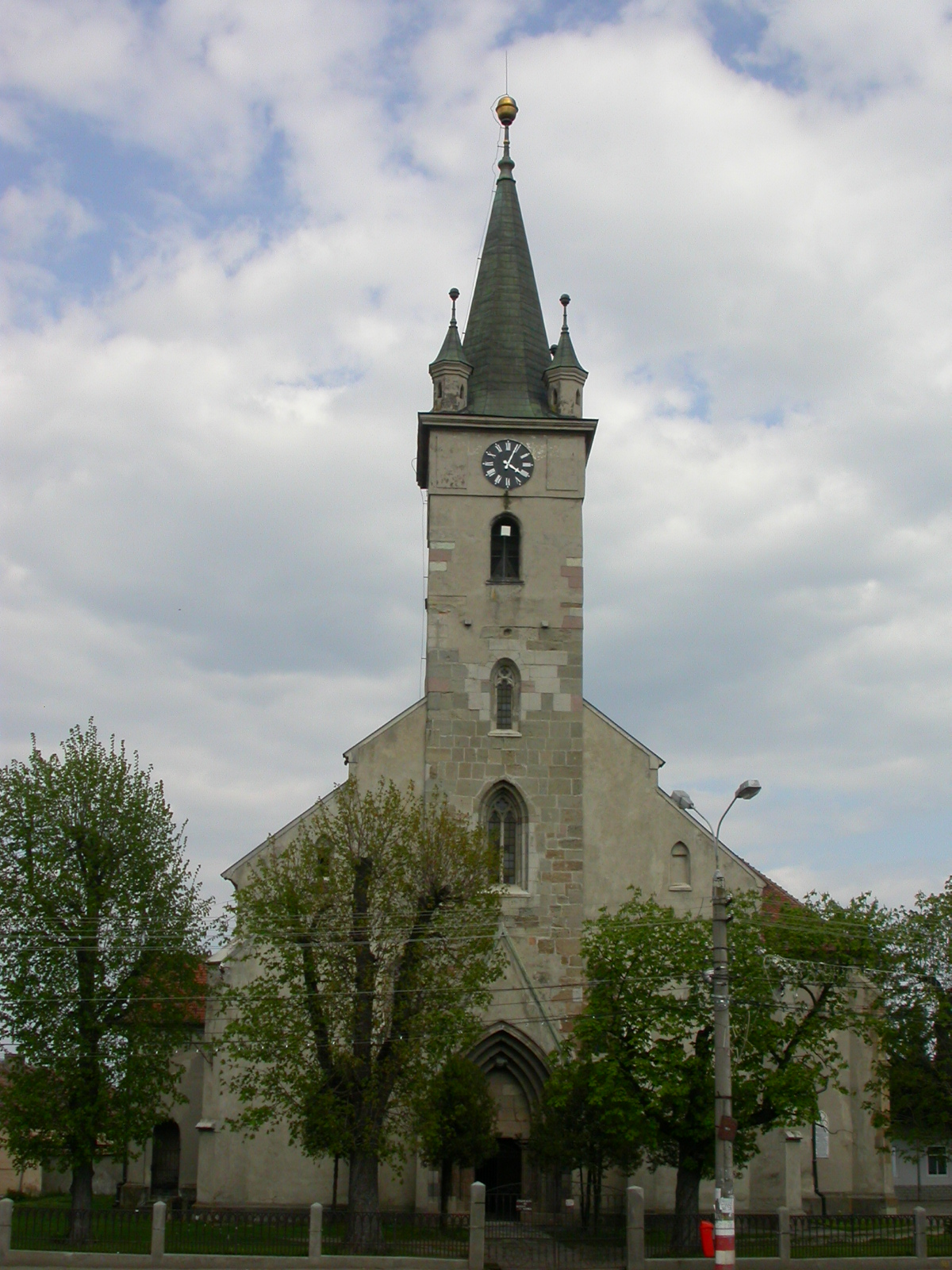 Ansamblul bisericii evanghelice, sec. XIII-XIX 01